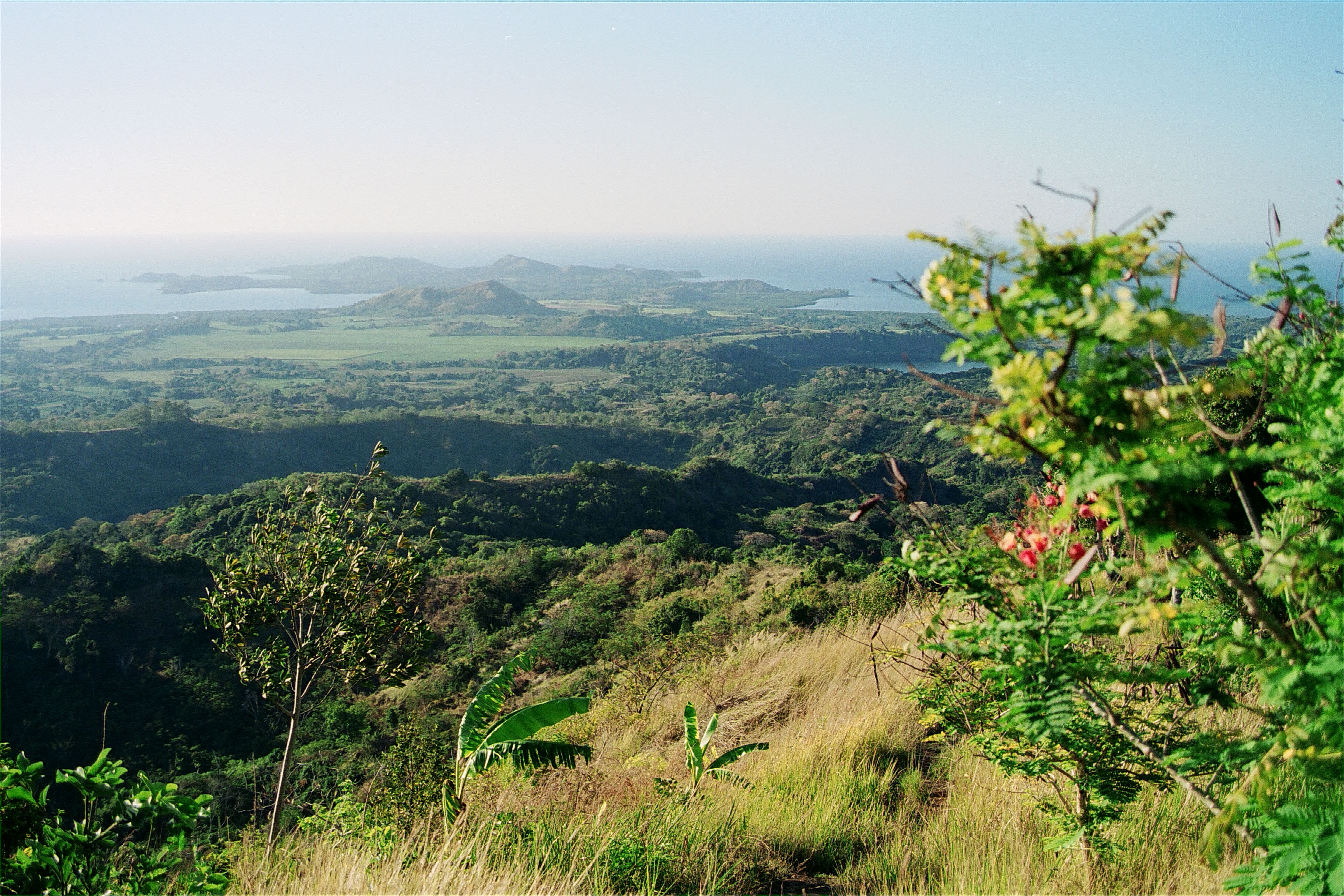 Vue sur l'océan depuis le Mont Passot à Nosy Be.